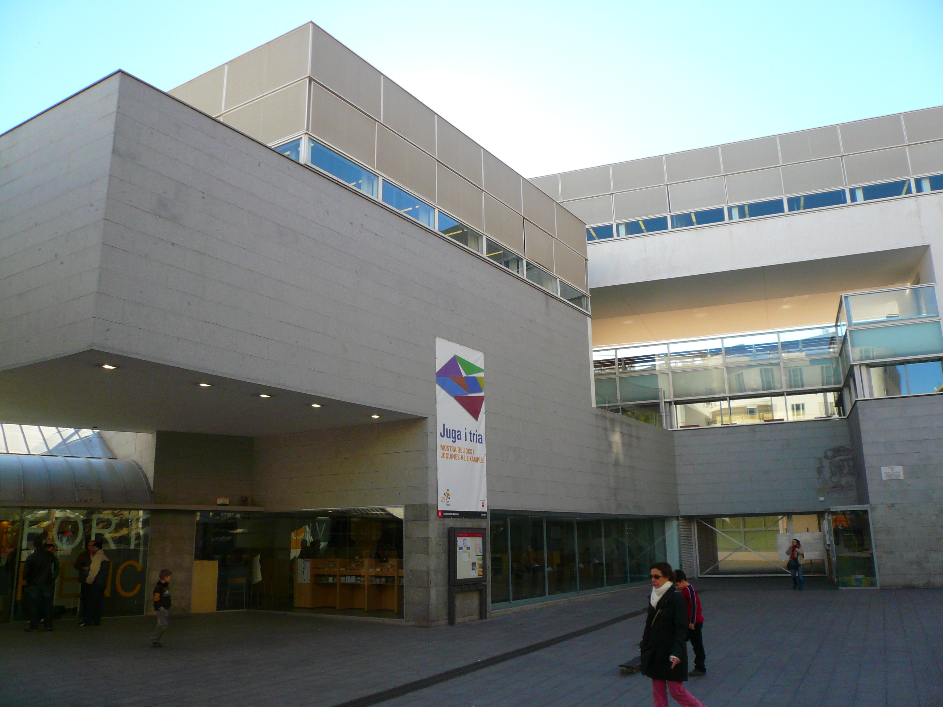 Mercat de Fort Pienc, Barcelona. Centre cívic Fort Pienc